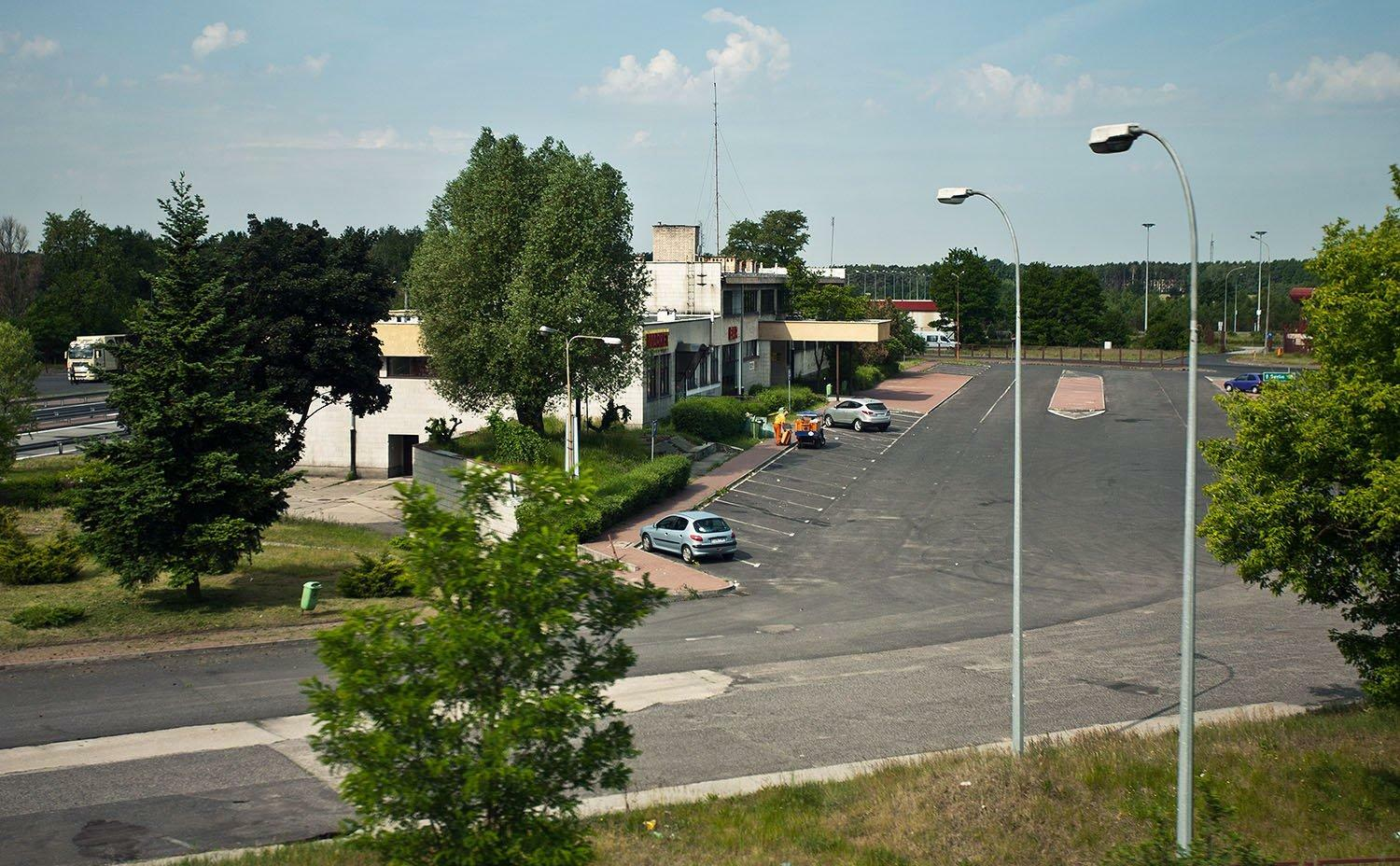 Budynki służb celnych na polsko-niemieckiej granicy w Olszynie (Wrocław-Berlin). Tam, gdzie z prawa jest wysepka, stały wiaty osłaniające dużą część palcu przed deszczem, a na wysepce, o ile pamiętam stały pawilony wopistów.